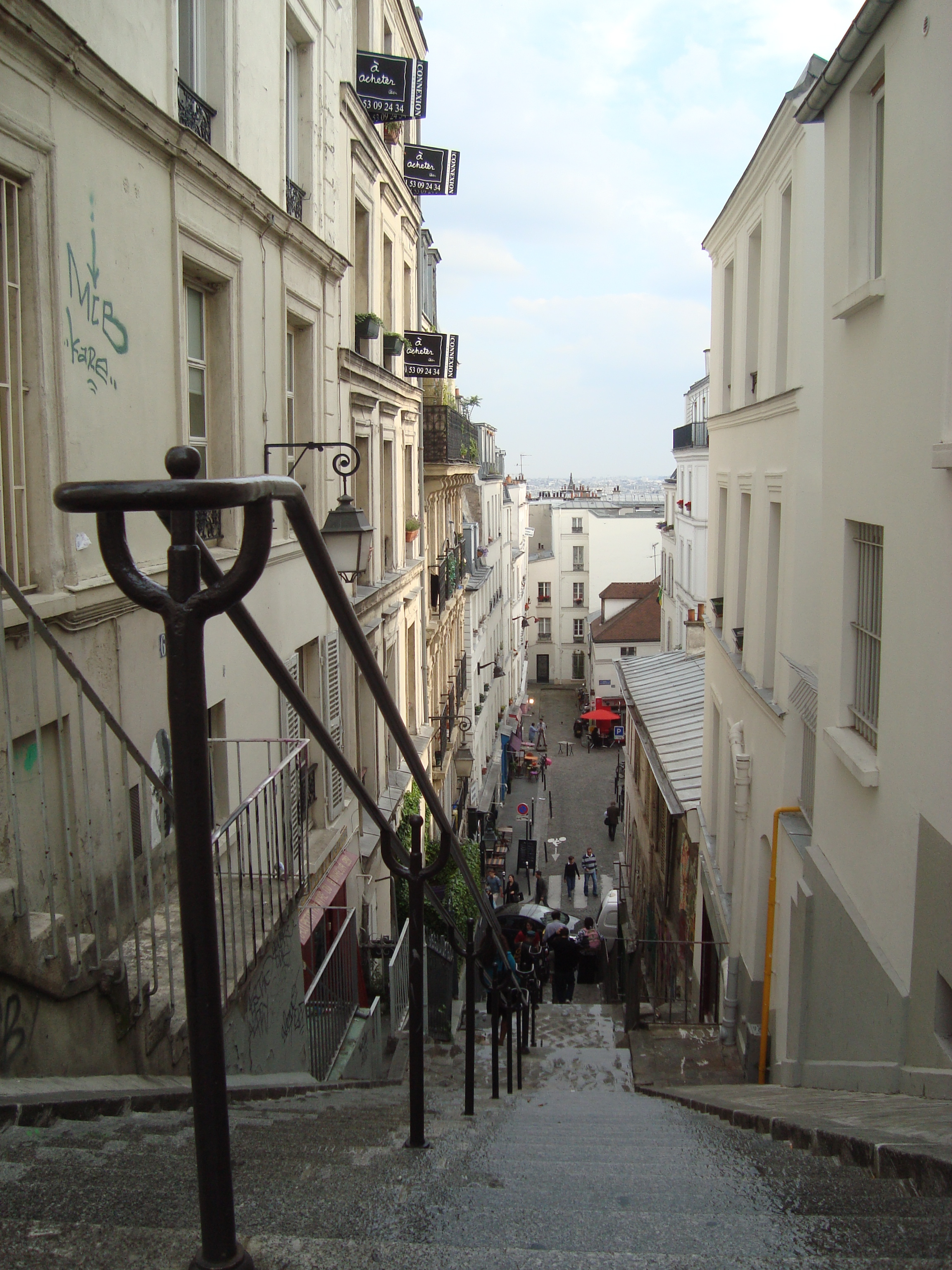 Rue Drevet à Paris sur la butte Montmartre